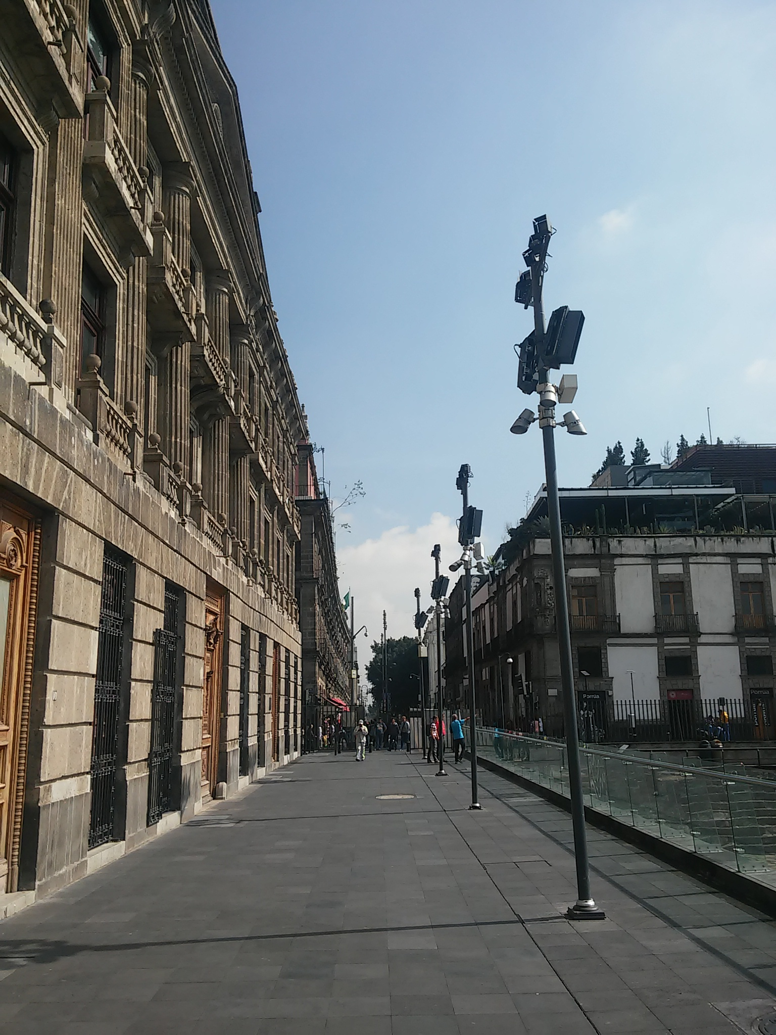 Vista de la calle República de Argentina hacia el norte, en el centro histórico de la ciudad de México